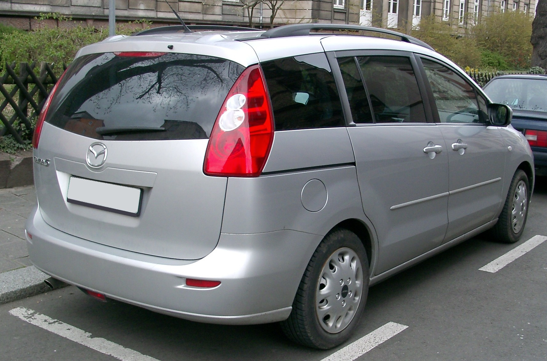 Mazda 5